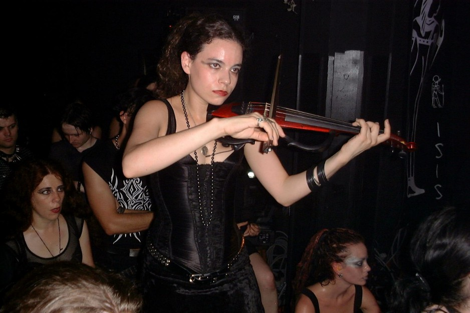 selbst fotografiert